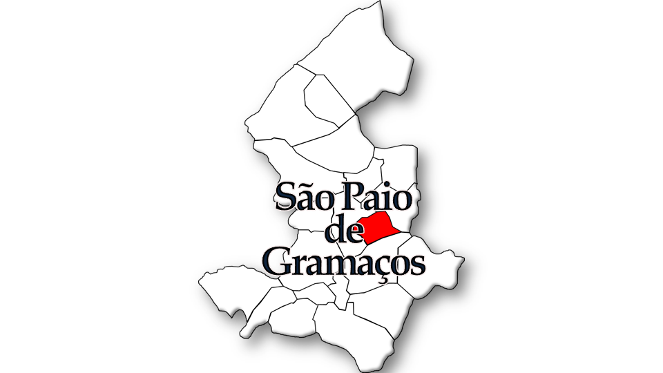 População